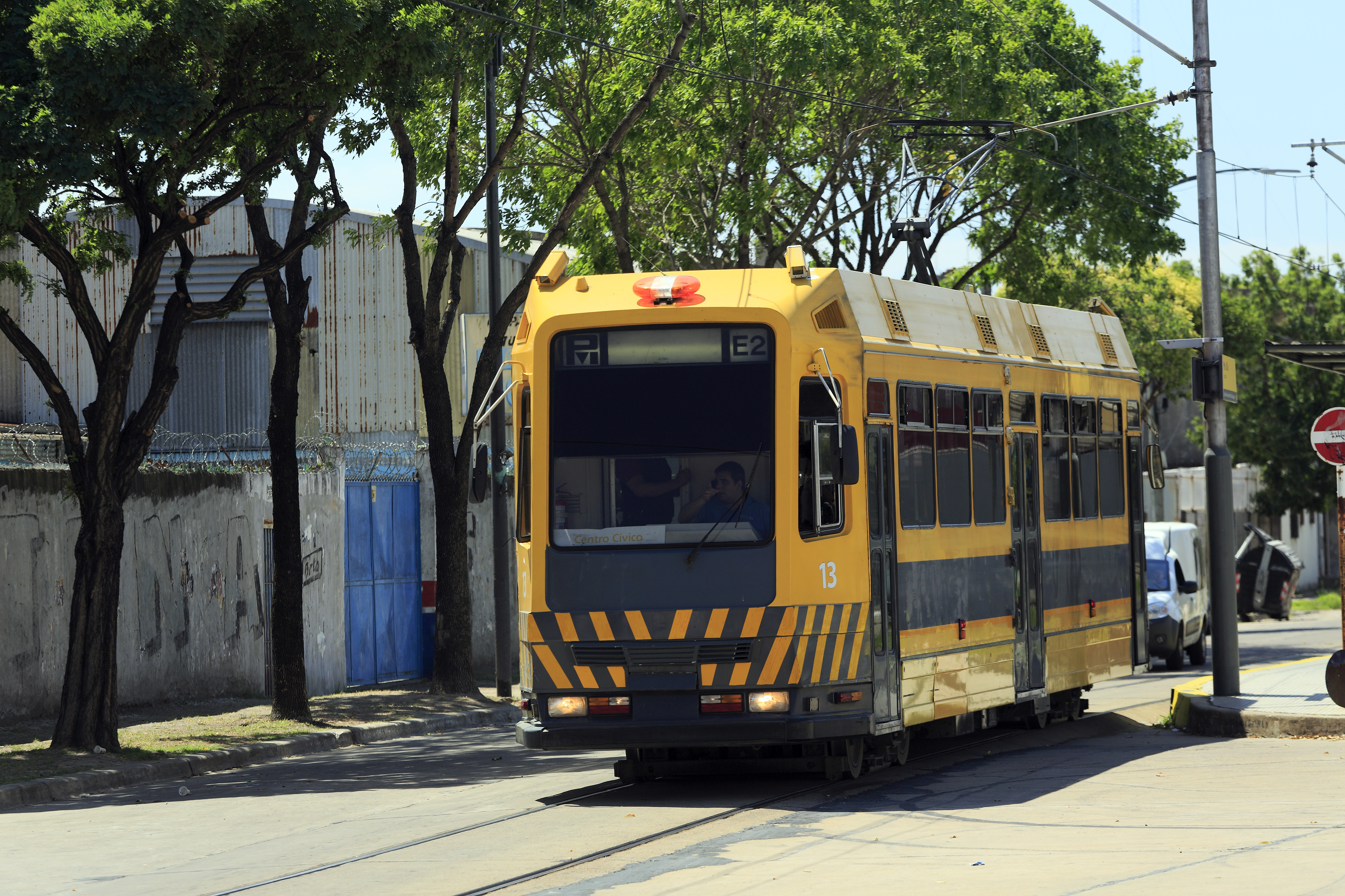 … nach Centro Cívico Lugano, der Wagen 13 ist einer der letzten ohne weiß-rote Warnaufkleber an den Wagenenden. Er verlässt den auf der linken Seite liegenden Bahnsteig.